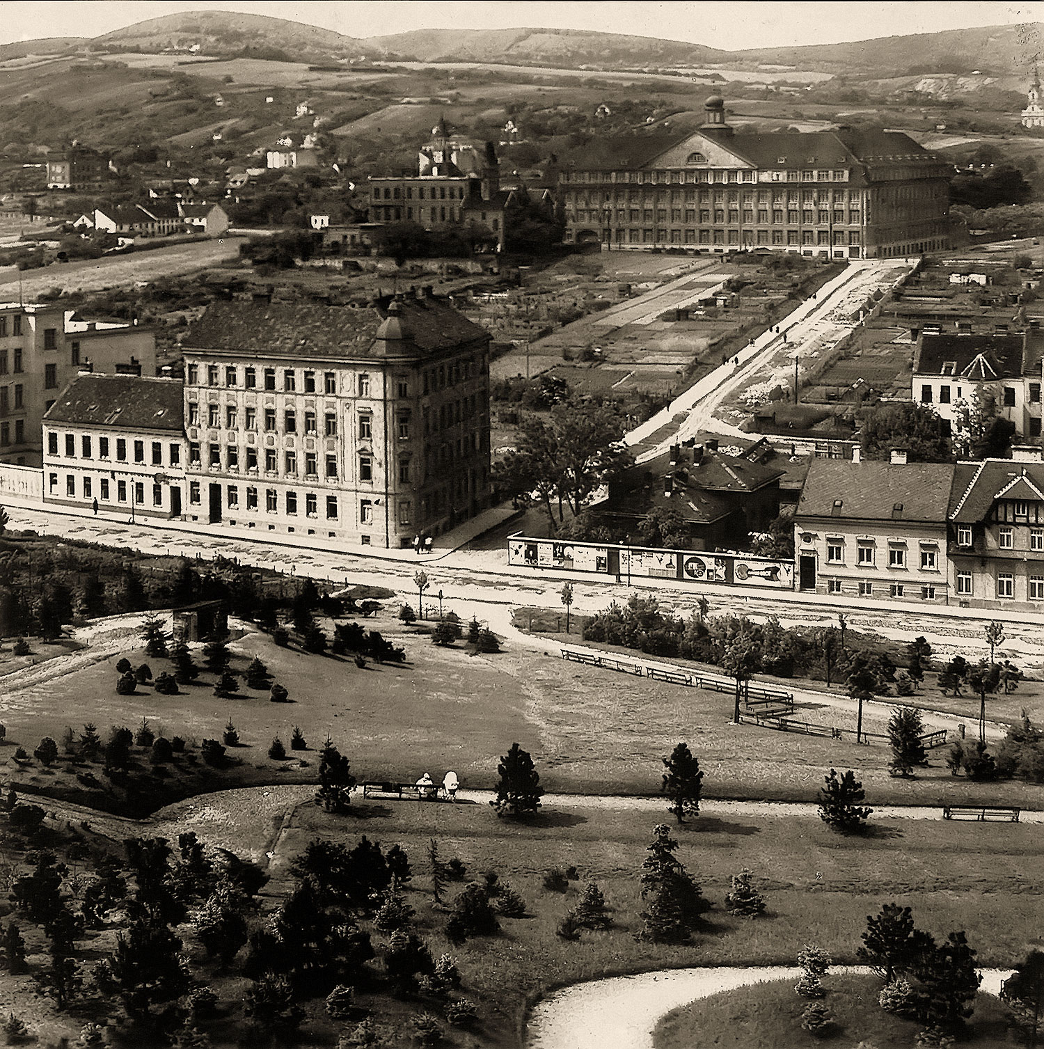 Hugo Wolf Park in Döbling, um 1920 im Vordergrund der Hugo Wolf Park, dann die Krottenbachstraße und im Hintergrund das ÖAF - Gräf & Stift Werk